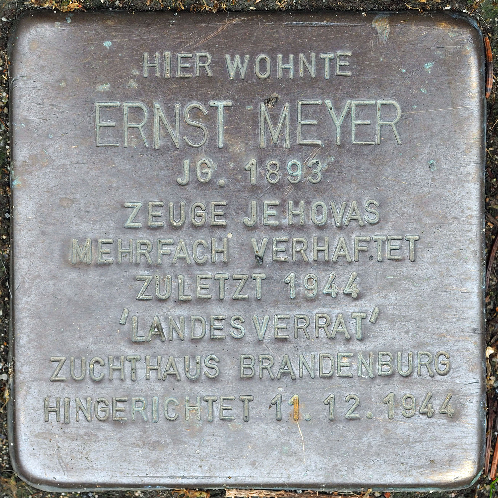 Stolpersteine MG: Meyer, Ernst